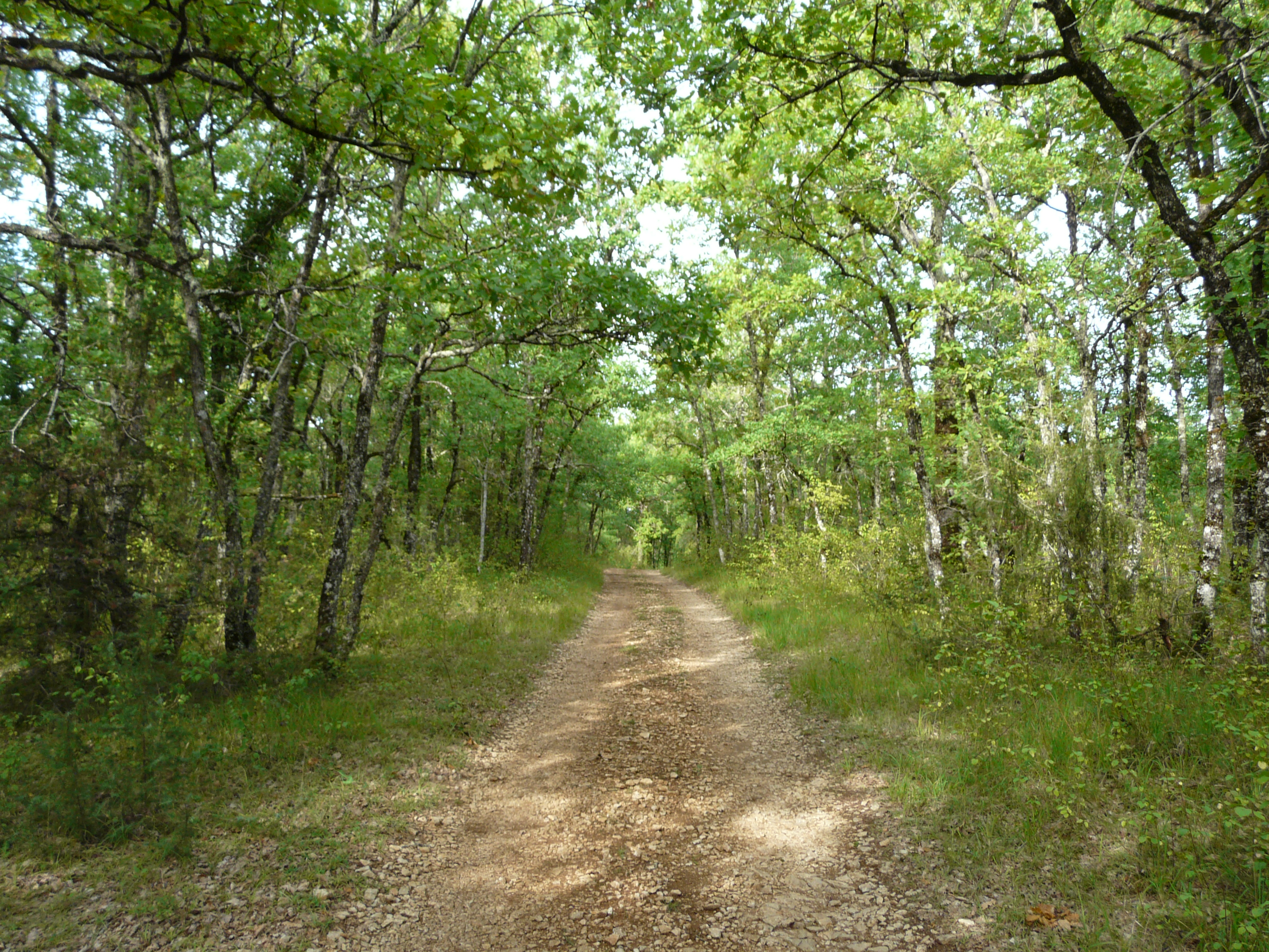 Le causse de Thenon près de Peyre Levade, Limeyrat, Dordogne, France.